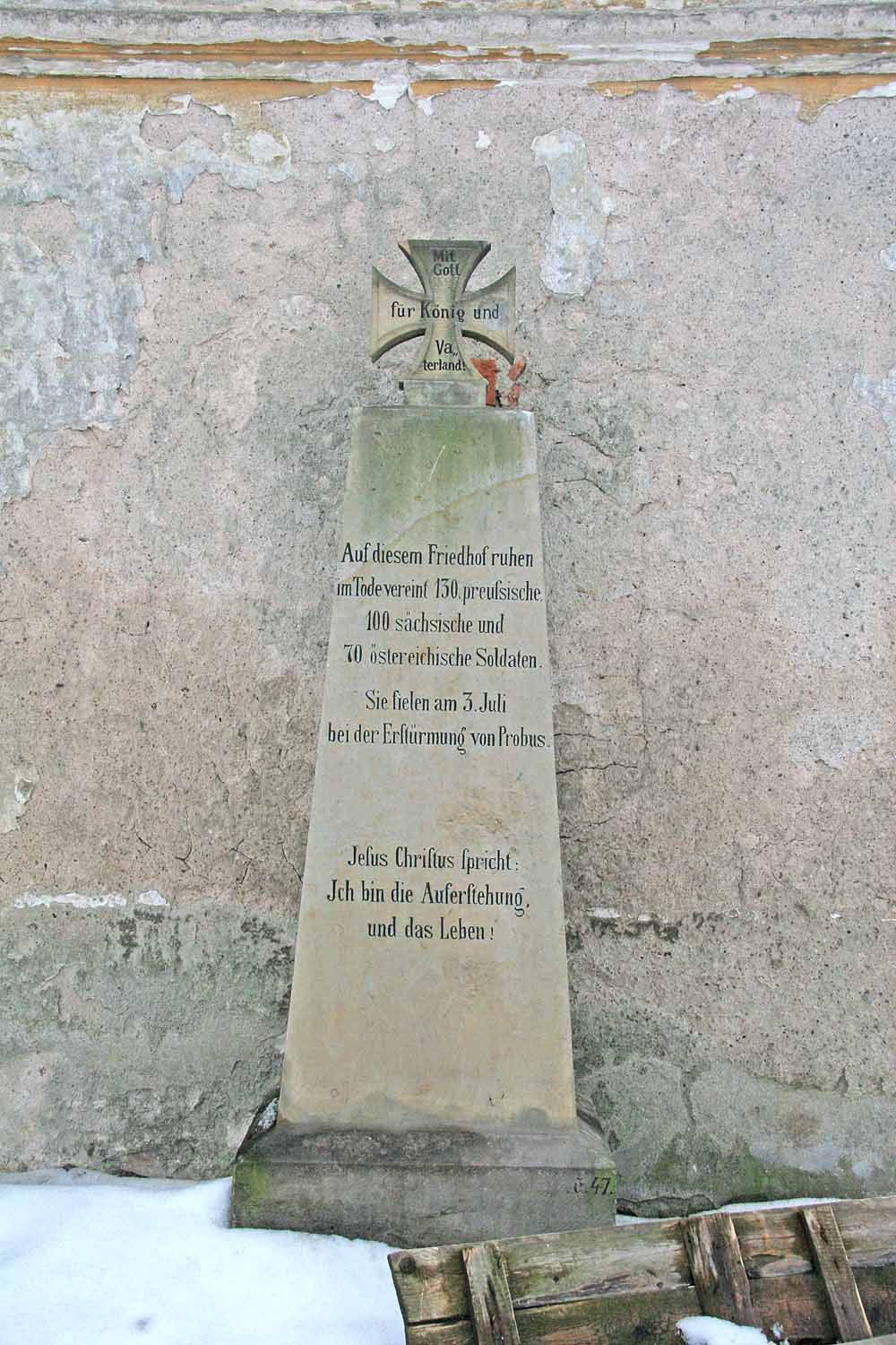 Probluz, část obce Dolní Přím, okres Hradec Králové. Pomník bitvy u Hradce Králové v roce 1866. Mohutná typová pískovcová pyramida na vrcholu s dělovým křižem z téhož materiálu označuje hromadný hrob l30 pruských, 100 saských a 70 rakouských vojáků jakož i 4 pruských důstojníků od 7. westfálského pěšího pluku č. 56. Věnována pruským řádem johanitů.